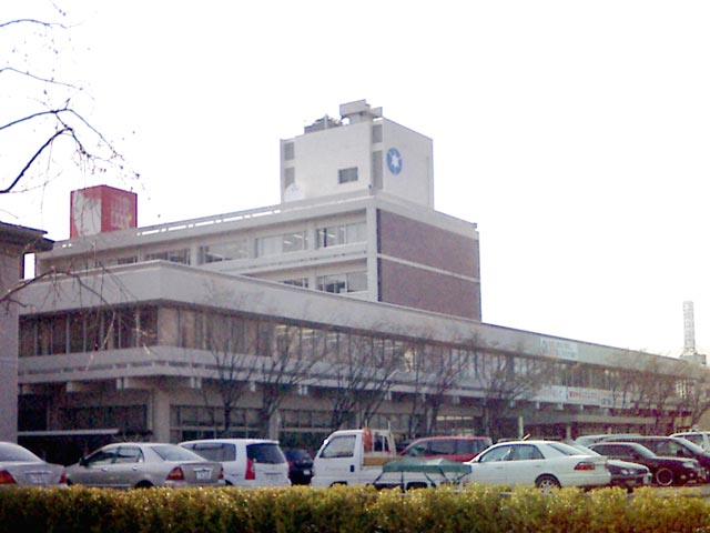 丸亀市の市役所 - 日本国香川県丸亀市。